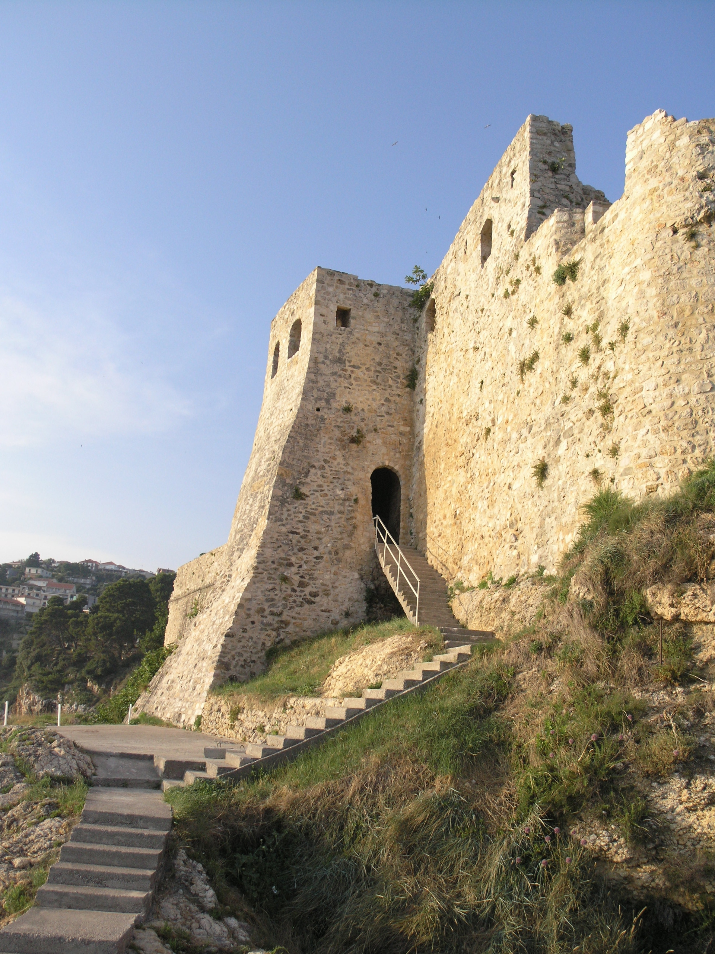 Černá Hora, Ulcinj - hradby starého města